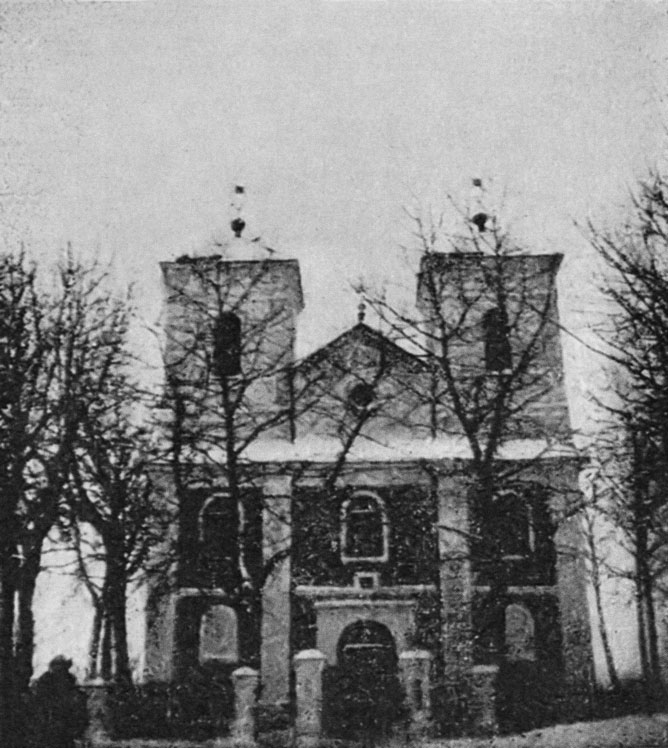 Беларуская (тарашкевіца): Гарбачэва (Harbačeva). Касьцёл